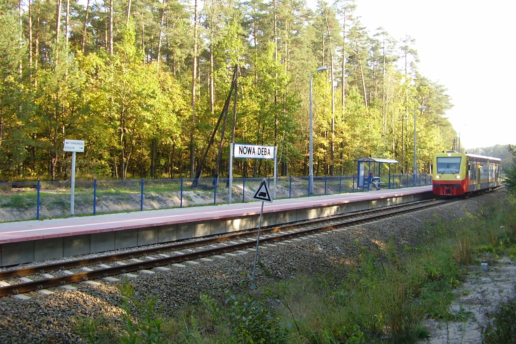 Przystanek kolejowy w Nowej Dębie. 2010-10-07